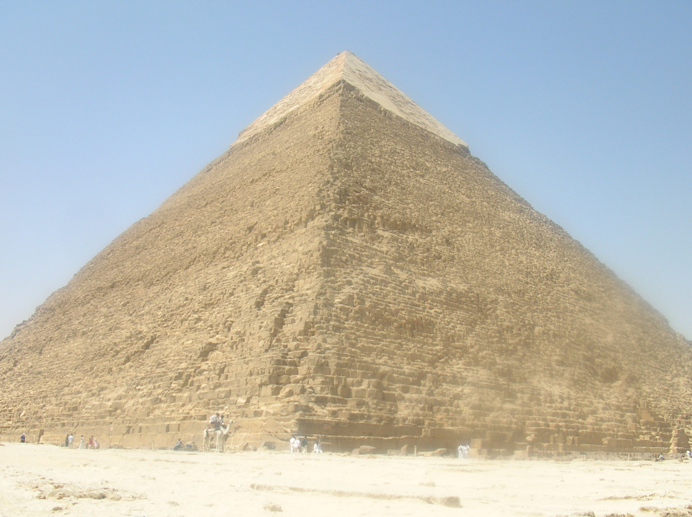 Den verdenskjente Khafrepyramiden som er den nest største i Giza